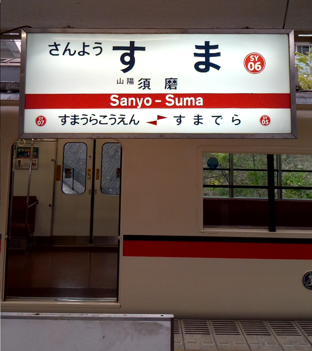 山陽電気鉄道・山陽須磨駅・駅名標 撮影日時：20190825 173701505